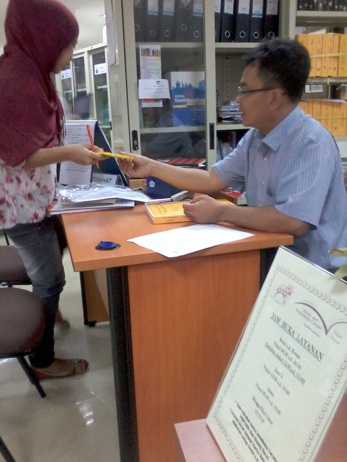 Pustakawan referensi melayani pemustaka